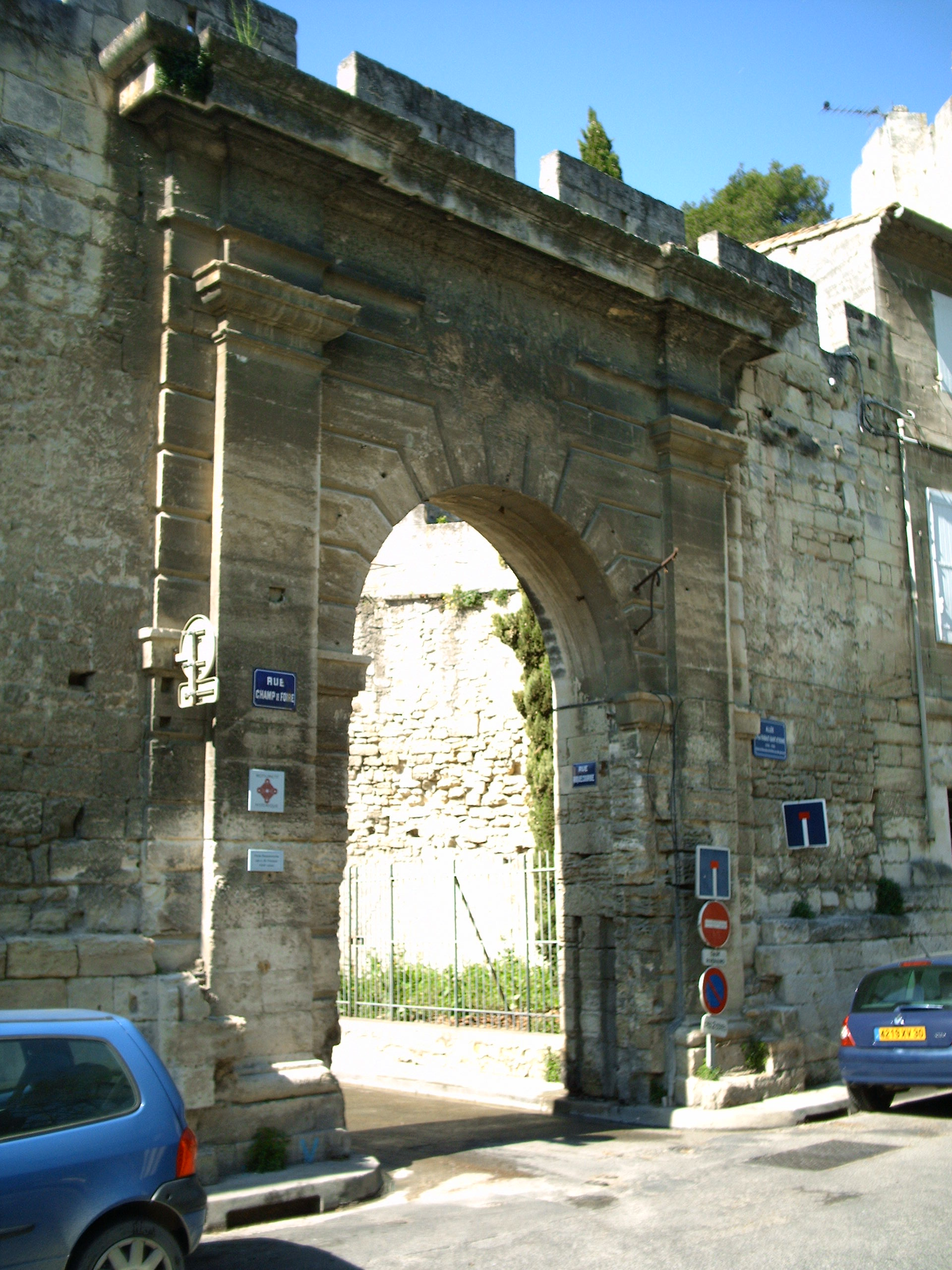 Vieille porte de Beaucaire (Gard)